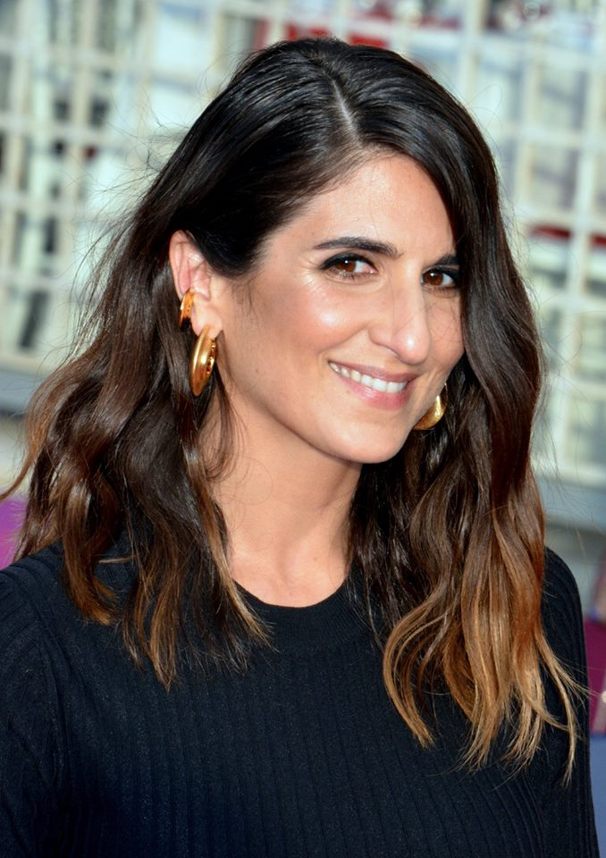 Géraldine Nakache au festival de Cabourg